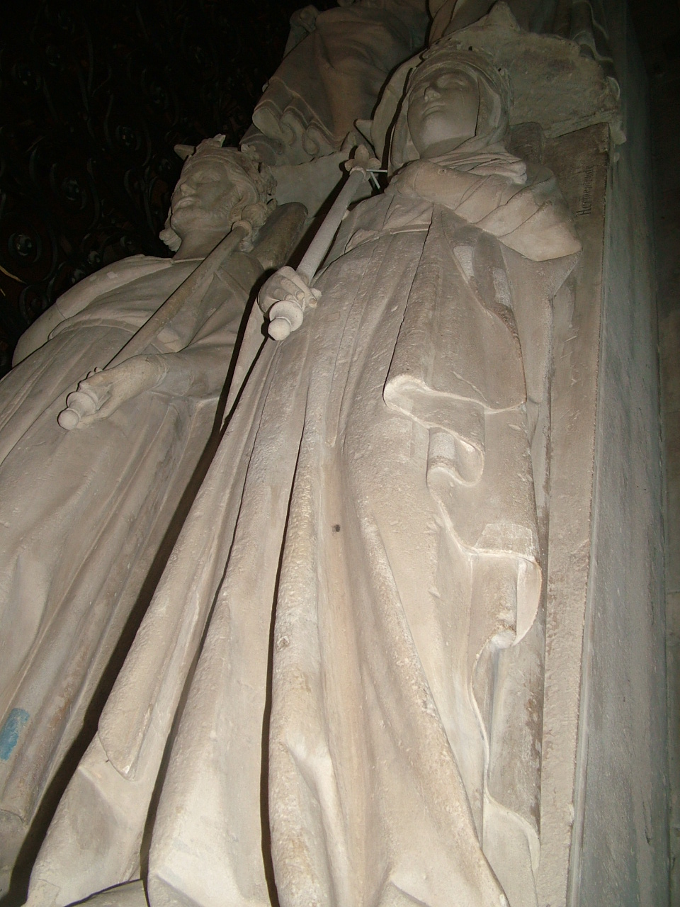 Grab der Königin Ermentrude von Orléans in Saint-Denis